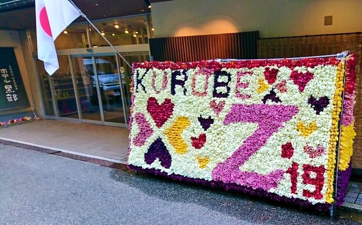 19年は、近隣でライブを開催した「ももいろクローバーZももいろクローバーZ」をイメージ